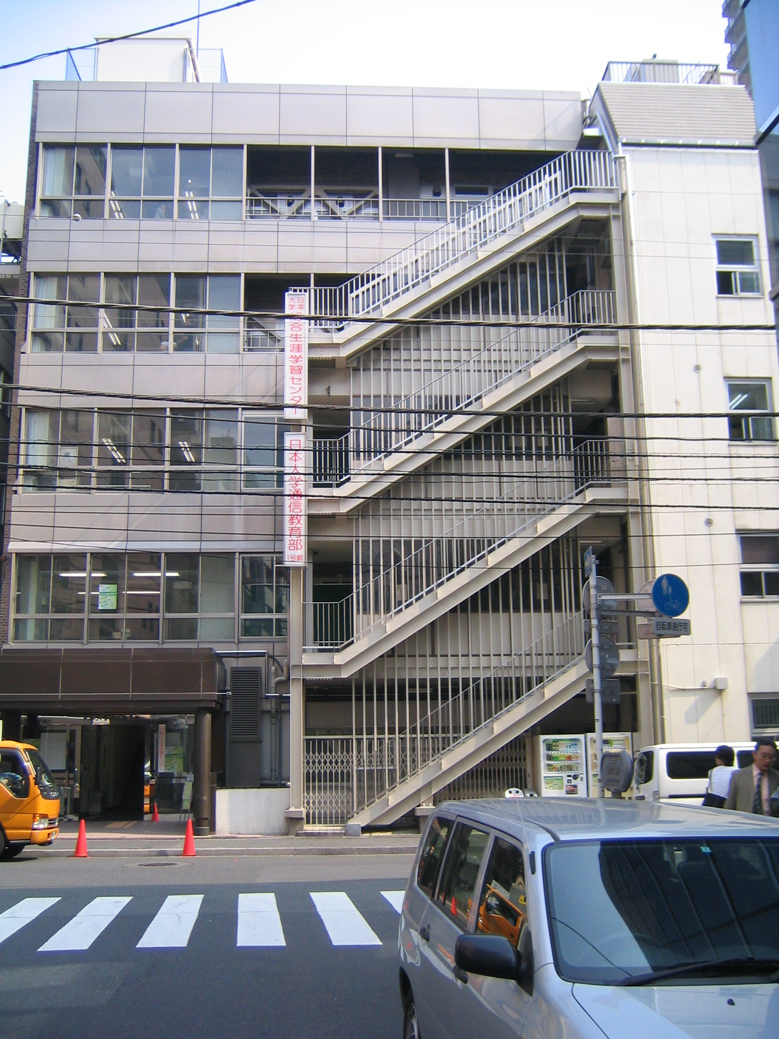 日本大学通信教育部校舎（日本大学総合生涯学習センター）